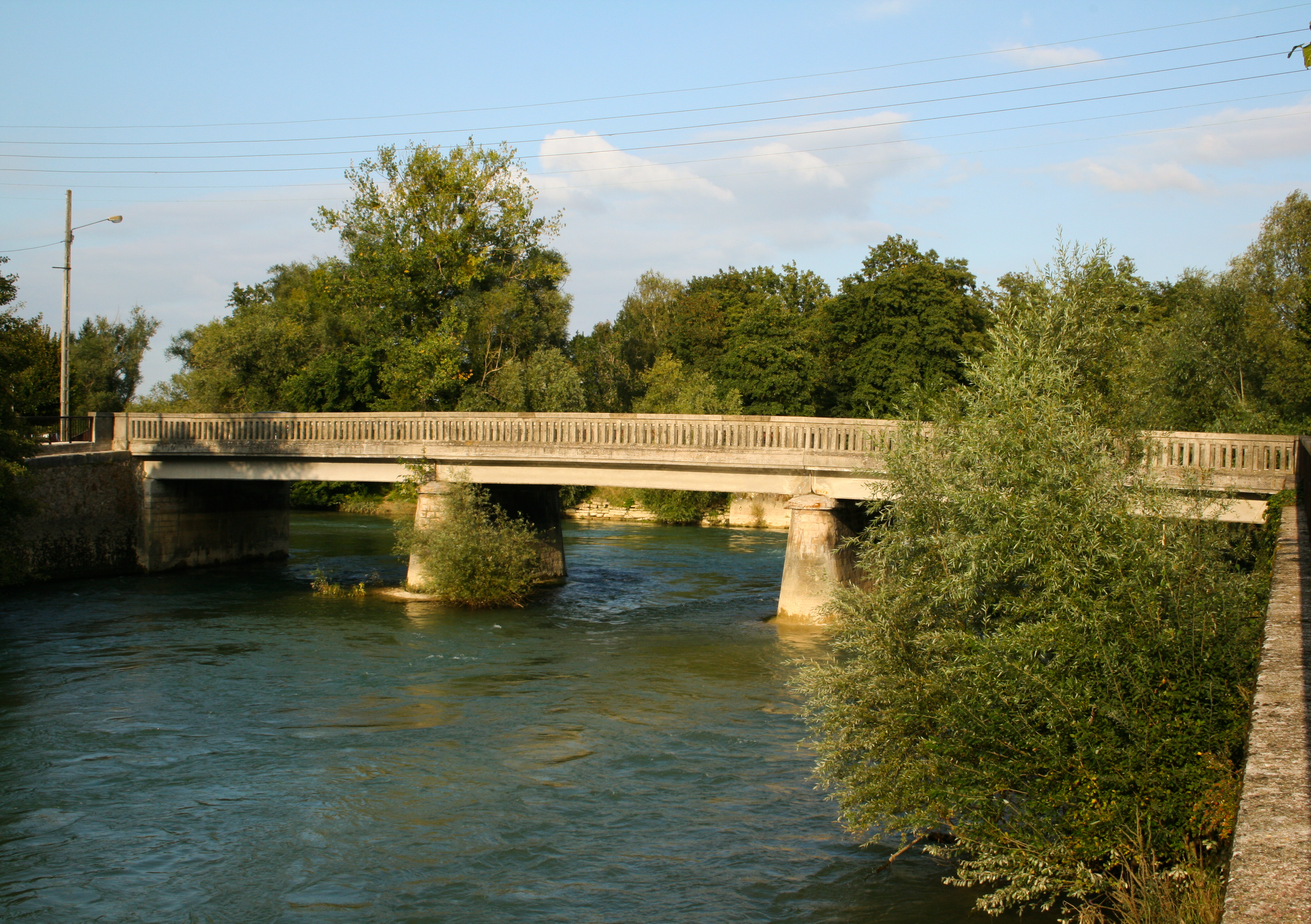 Le Pont de l'Aube à Arcis-sur-Aube, détruit en juin 1940, reconstruit en 1941-1942, détruit le 27 aout 1944, réparé par la population le 28 aout 1944 et reconstruit en 1945-1946